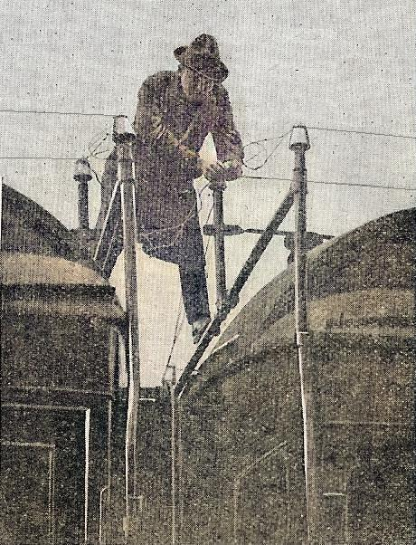 antenne radio de train SNCF ou Administration des chemins de fer de l'État vers 1925.